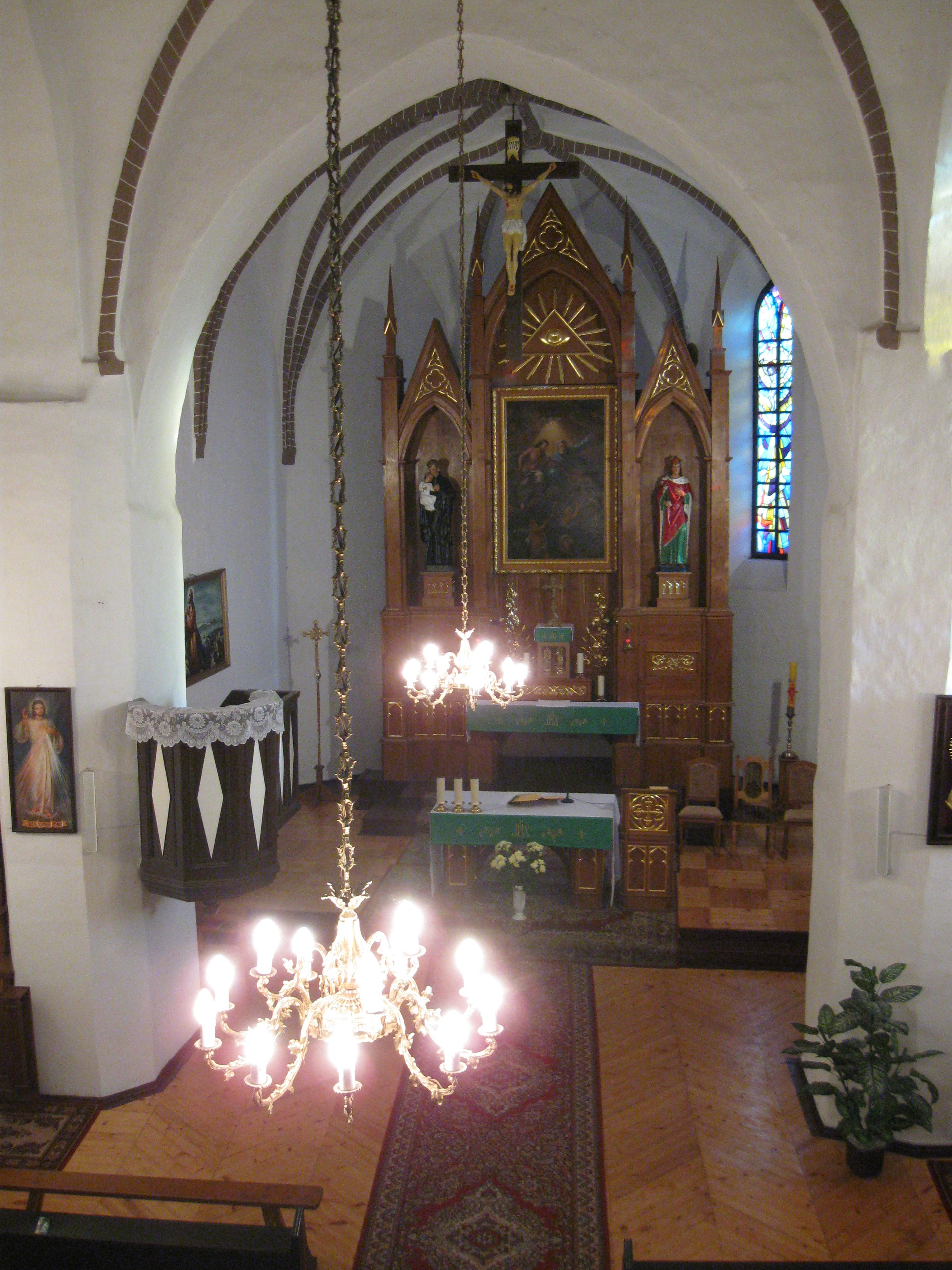 Беларуская (тарашкевіца): Троіцкі касьцёл. в. Ішкальдзь This is a photo of Belarusian heritage monument. Reference number: 112Г000057 ( WLM)